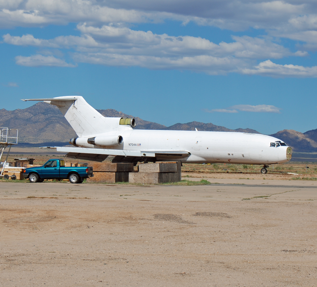 RIP